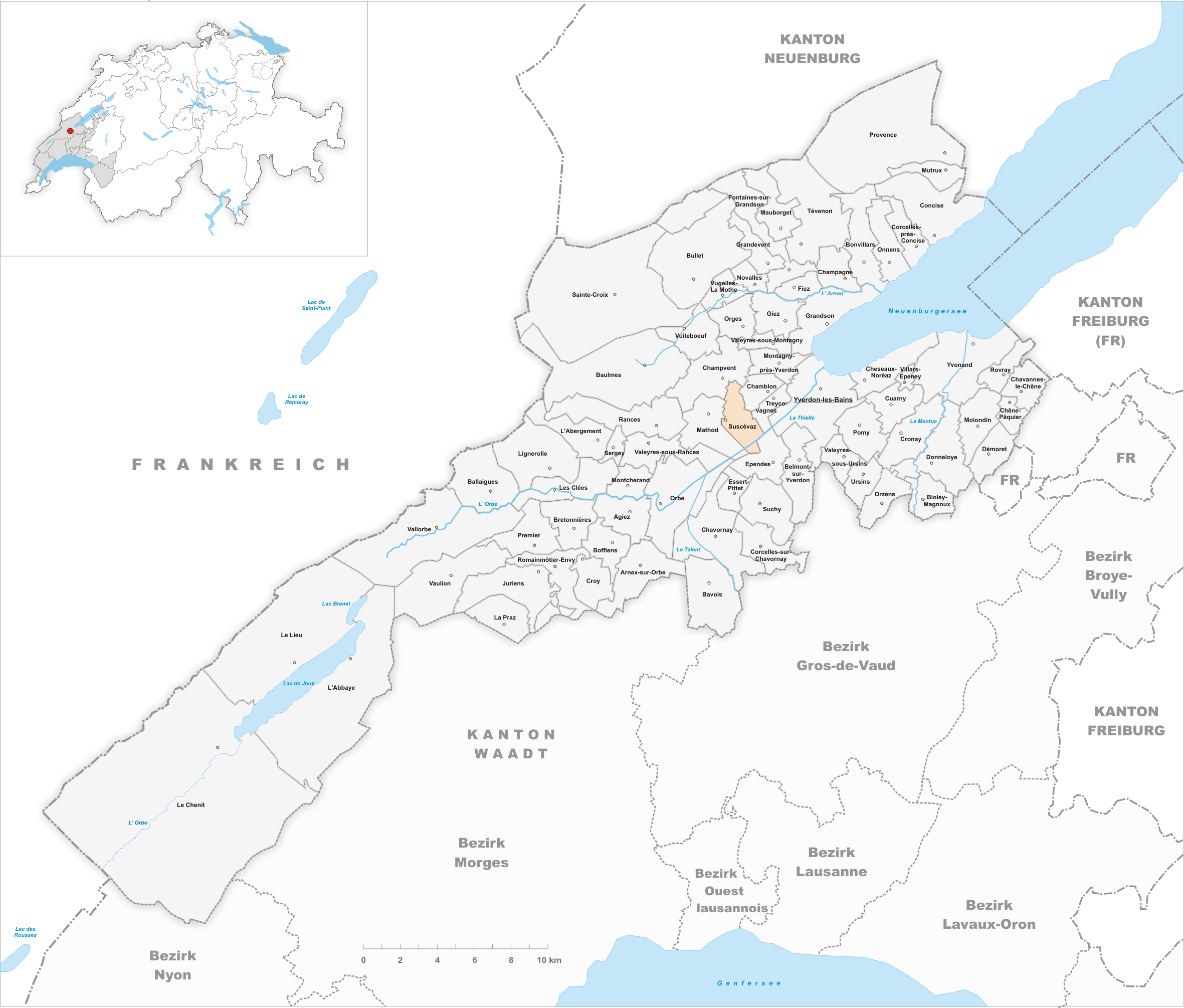 Municipality Suscévaz